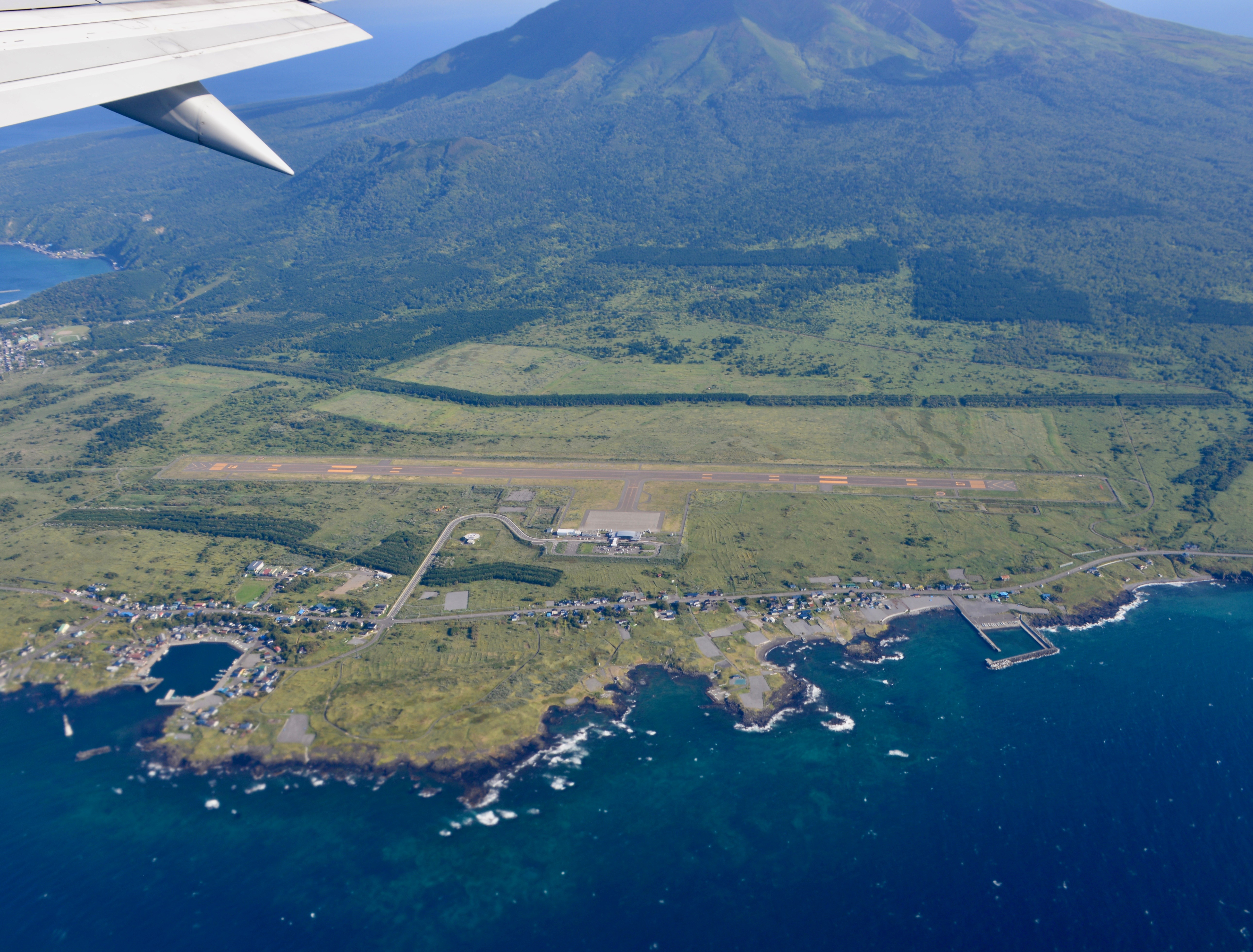 利尻島利尻空港